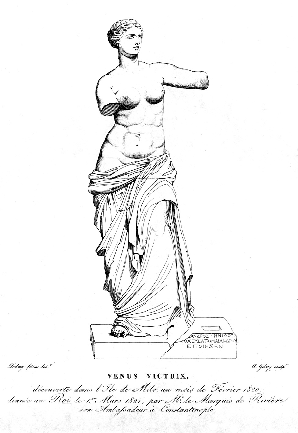 Engraving from frontispiece of "Sur la statue antique de Vénus Victrix : découverte dans l'île de Milo en 1820, transportée à Paris et donée au roi par M. le Marquis de Rivière ... ; et, Sur la statue antique connue sous le nom de l'Orateur du Germanicus, et d'un personnage romain en mercure." by Clarac, Frédéric, comte de, published 1821. Engraving shows the statue reassembled before it went on public display in 1821 at the Royal Museum (now the Louvre Museum).